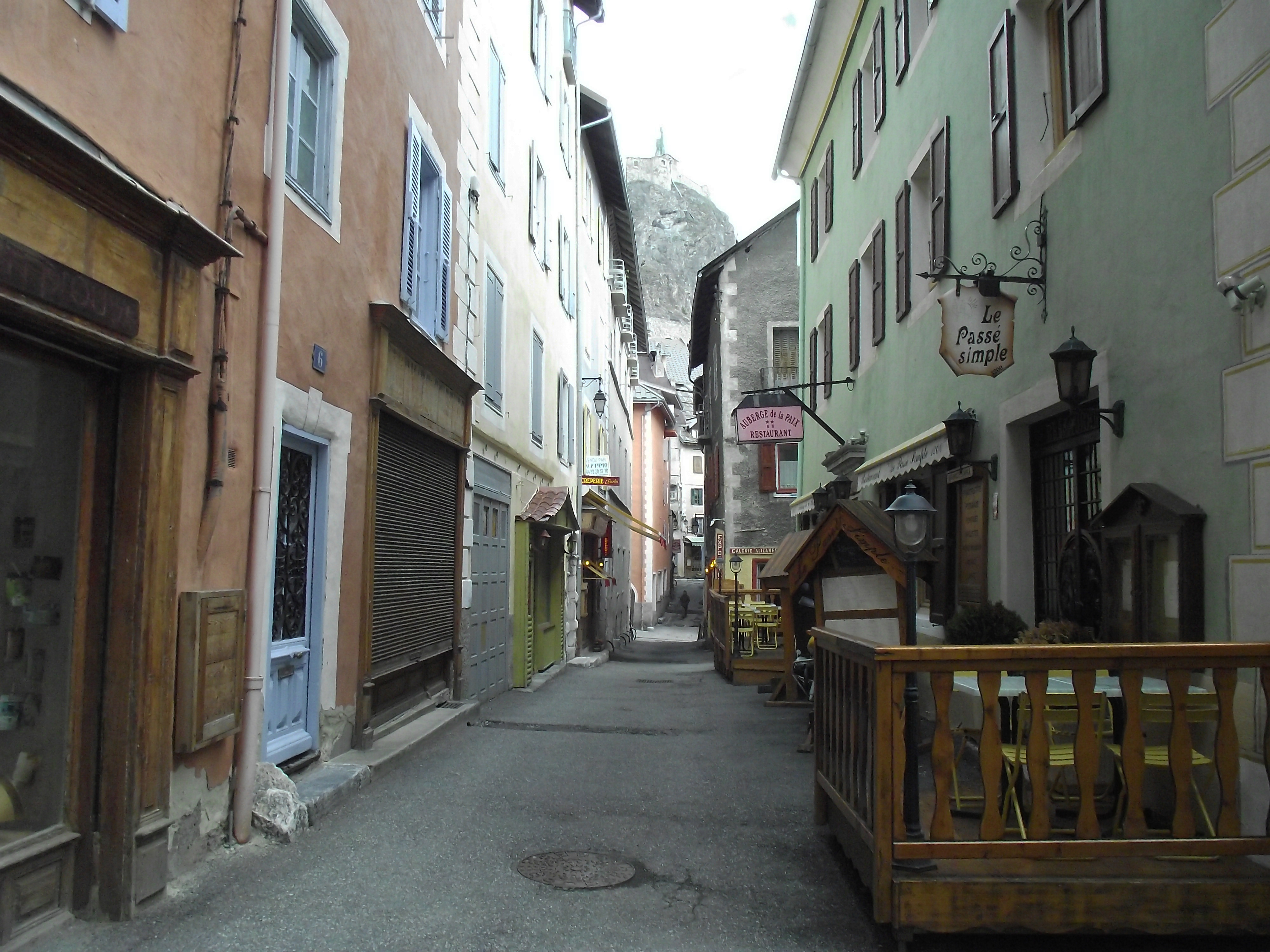 Rue Porte Meane